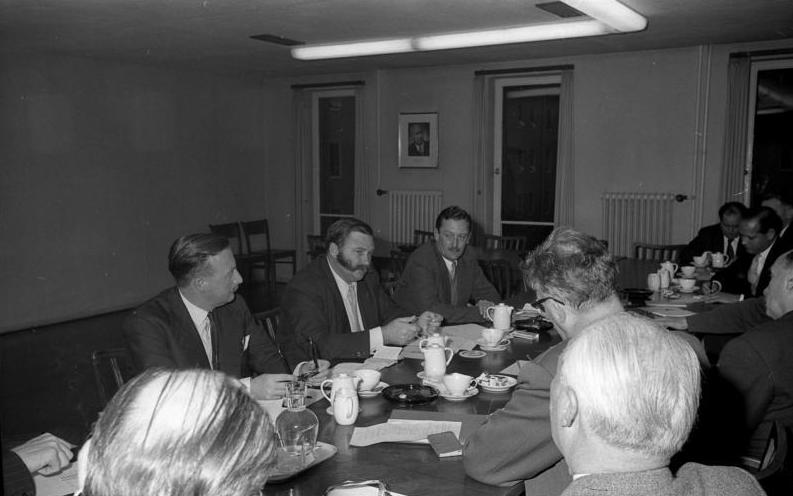 Ministerialdirigent Dr. Reinhardt, Bundesministerium für Wirtschaft, empfängt den Landwirtschafts-Minister von Kenya, Bruce McKenzie von links nach rechts: Mr. Galsworthy, Colonial Office London, Mr. McKenzie, Landwirtschaftsminister von Kenia, Mr. Havelock, Länderminister von Kenia, gegenüber (zurückgelehnt) Ministerialdirigent Dr. Reinhardt